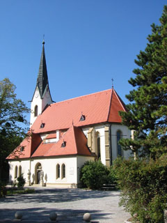 Pfarrkirche St. Vitus in Kritzendorf, vom Vitusplatz aus gesehen